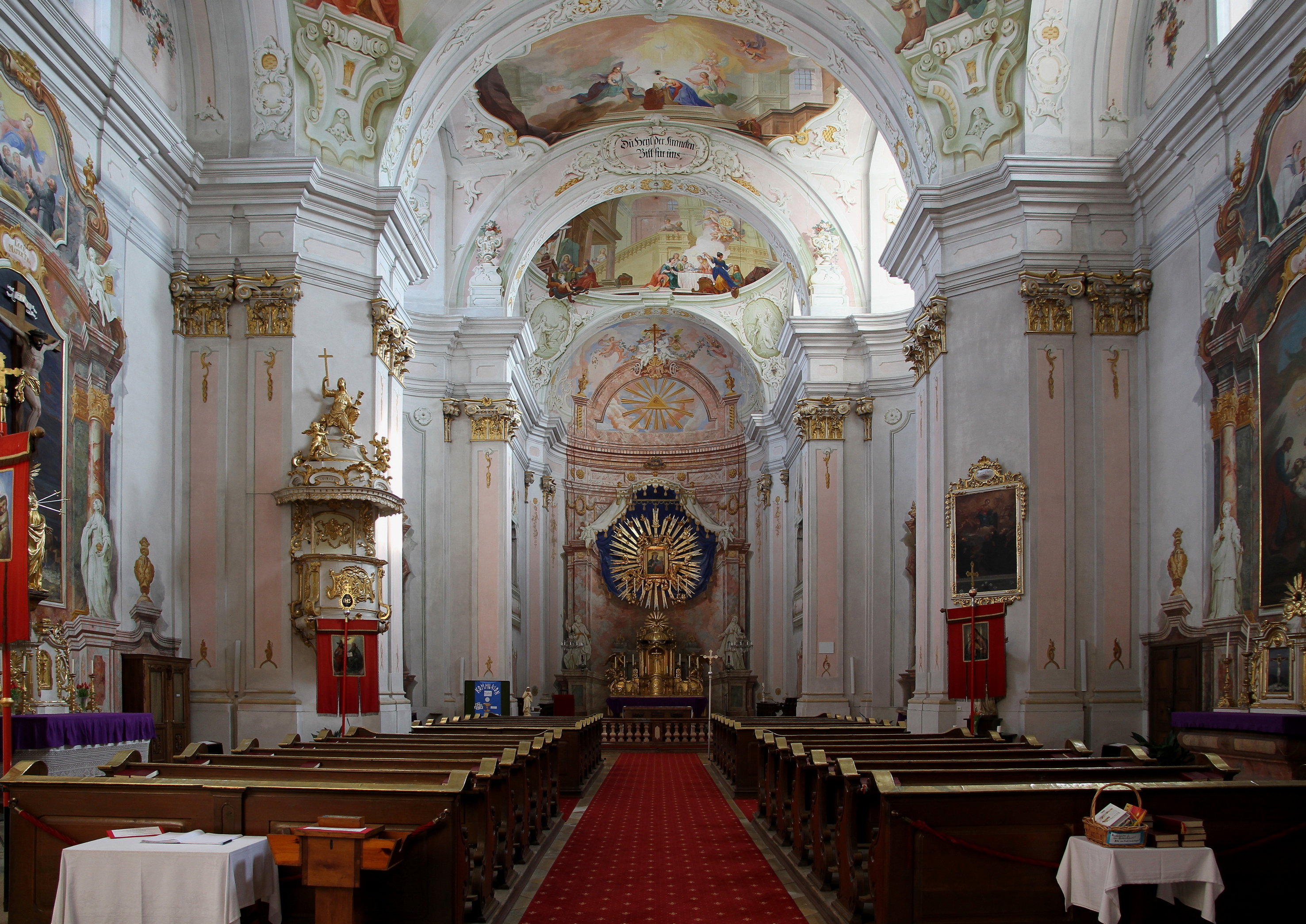 Innenansicht der katholischen Pfarr- und Wallfahrtskirche Mariae Geburt in der niederösterreichischen Ortschaft Maria Langegg mit Freskos aus der Werkstatt Joseph Adam Ritter von Mölk.